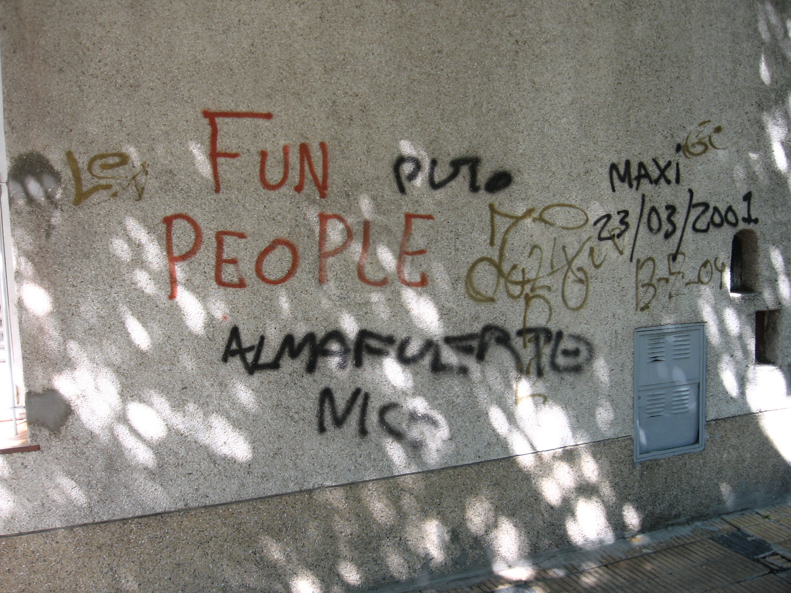 Un grafiti del grupo "Fun People", situado en la calle Joaquin V. Gonzalez con Gabriela Mistral (Buenos Aires). Yo mismo saqué la foto, libero todos los derechos y la pongo en el dominio público.